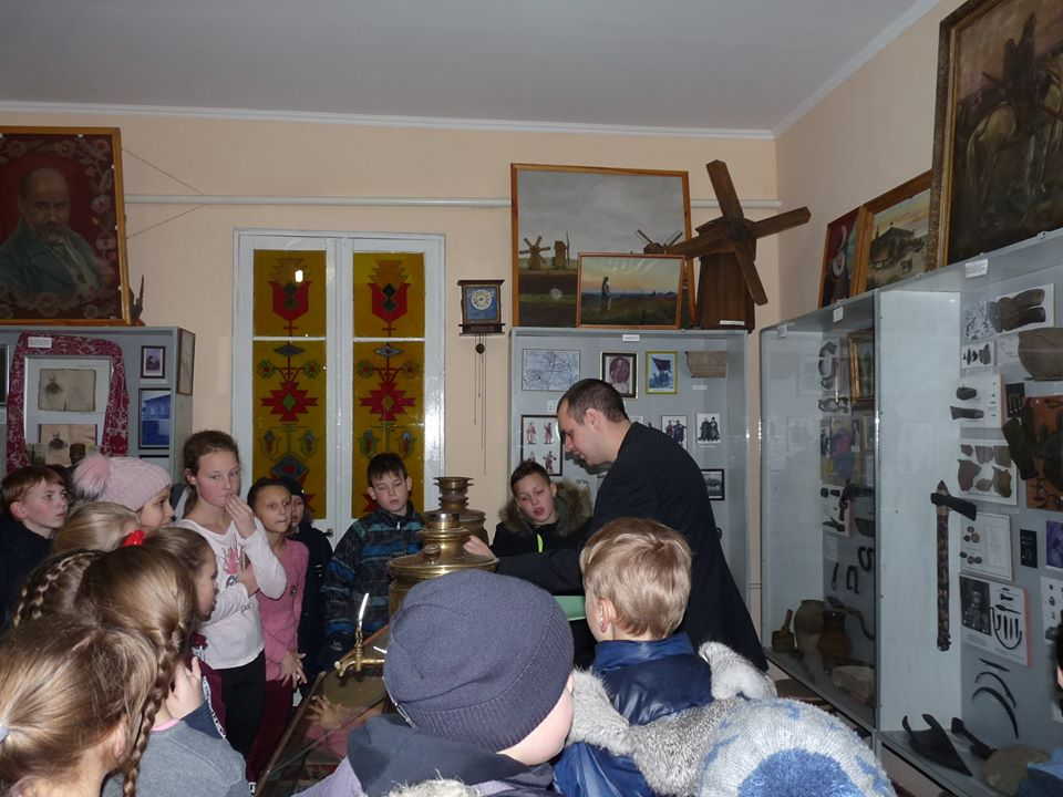 Перший зал Краєзнавчого музею Кролевецької міської ради